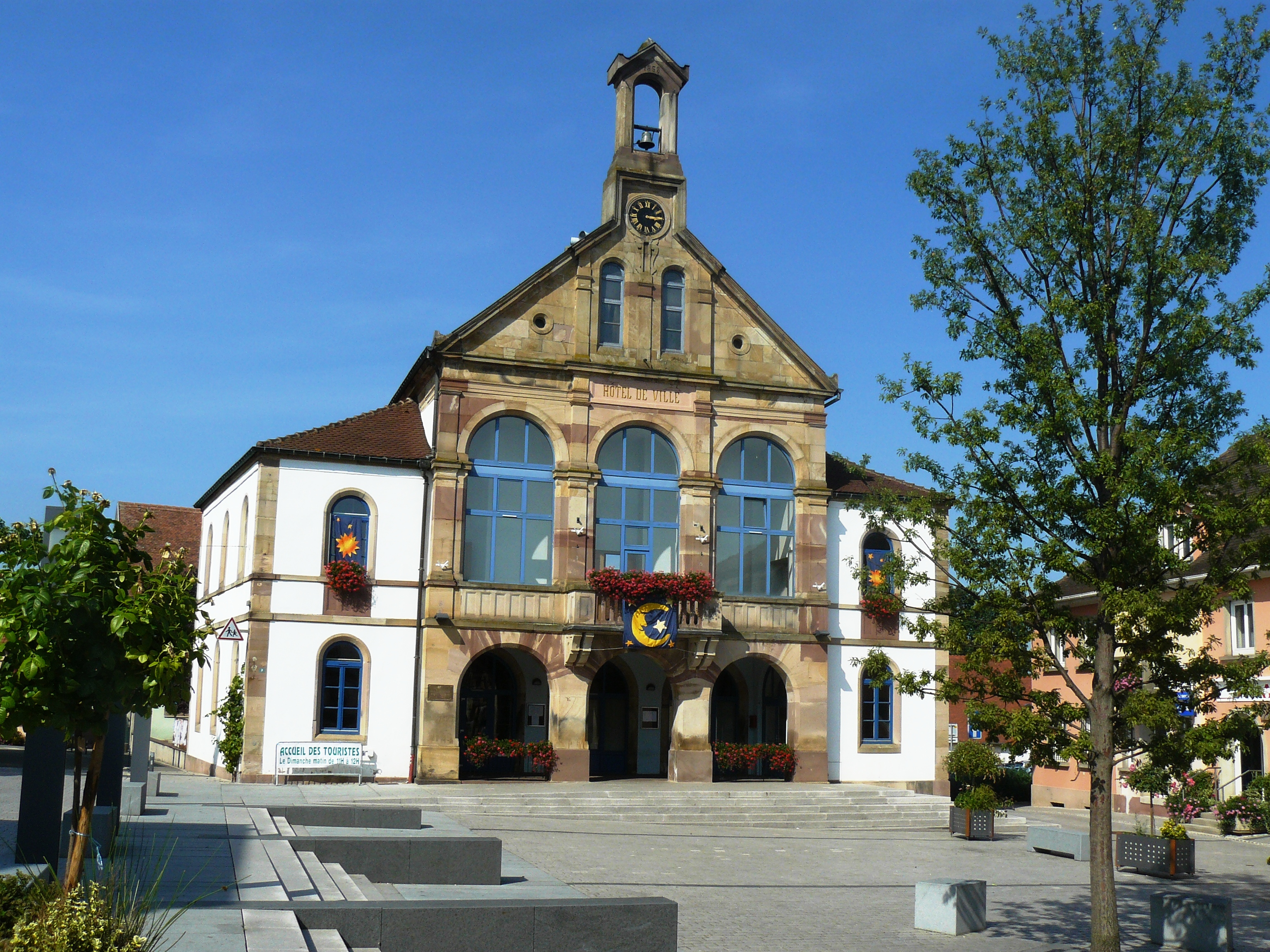 Hôtel de ville d'Epfig .